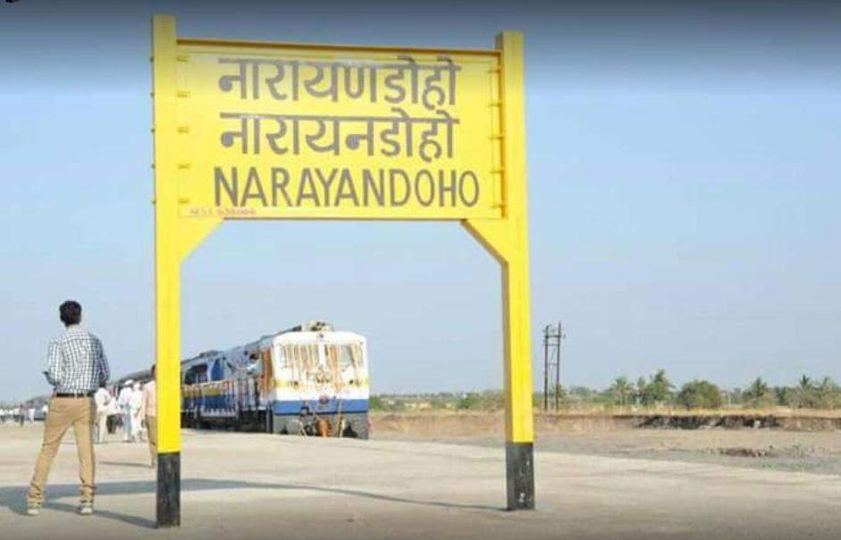 नारायणडोहो